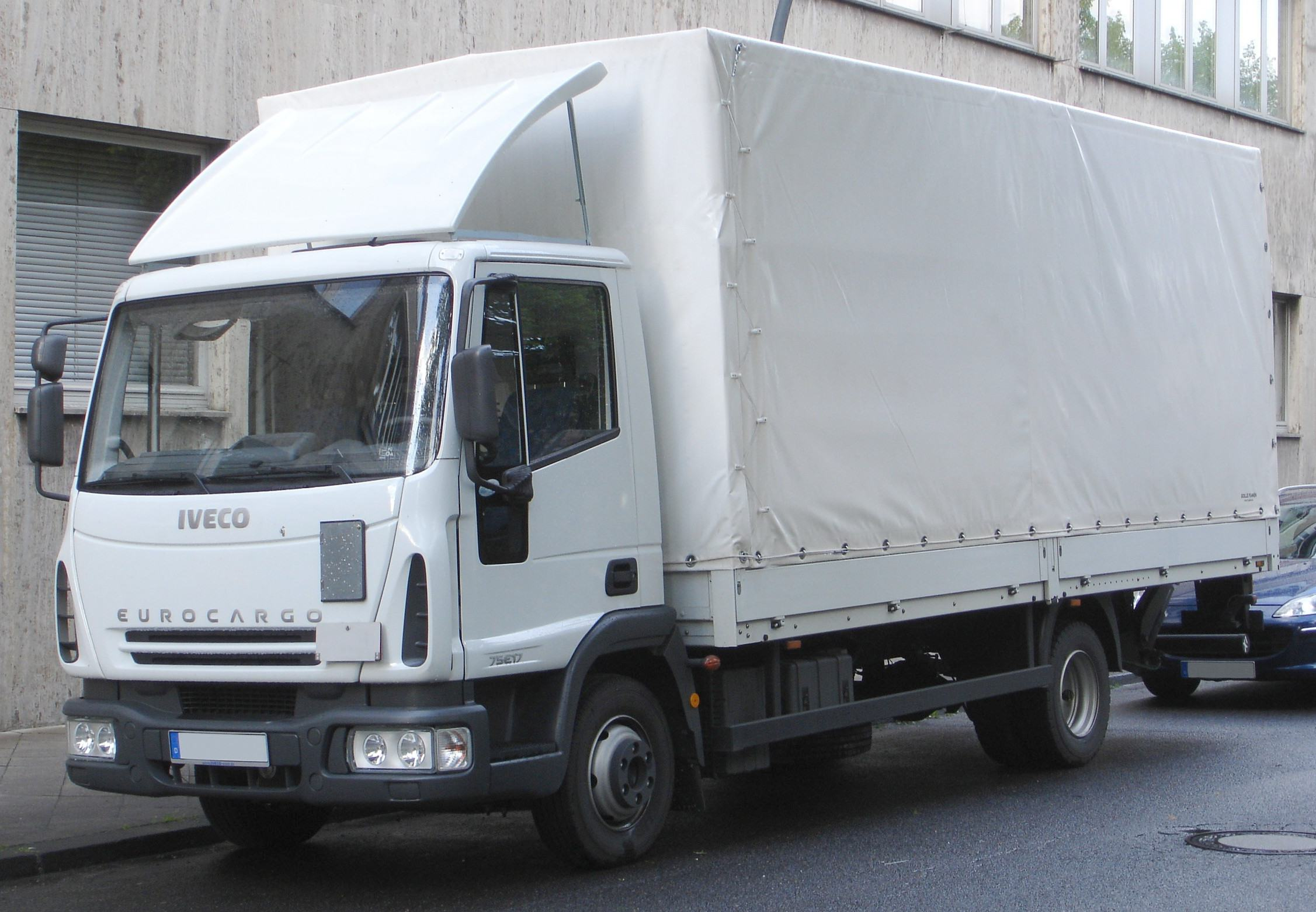 IVECO Eurocargo-II 75E17 Pritschenwagen